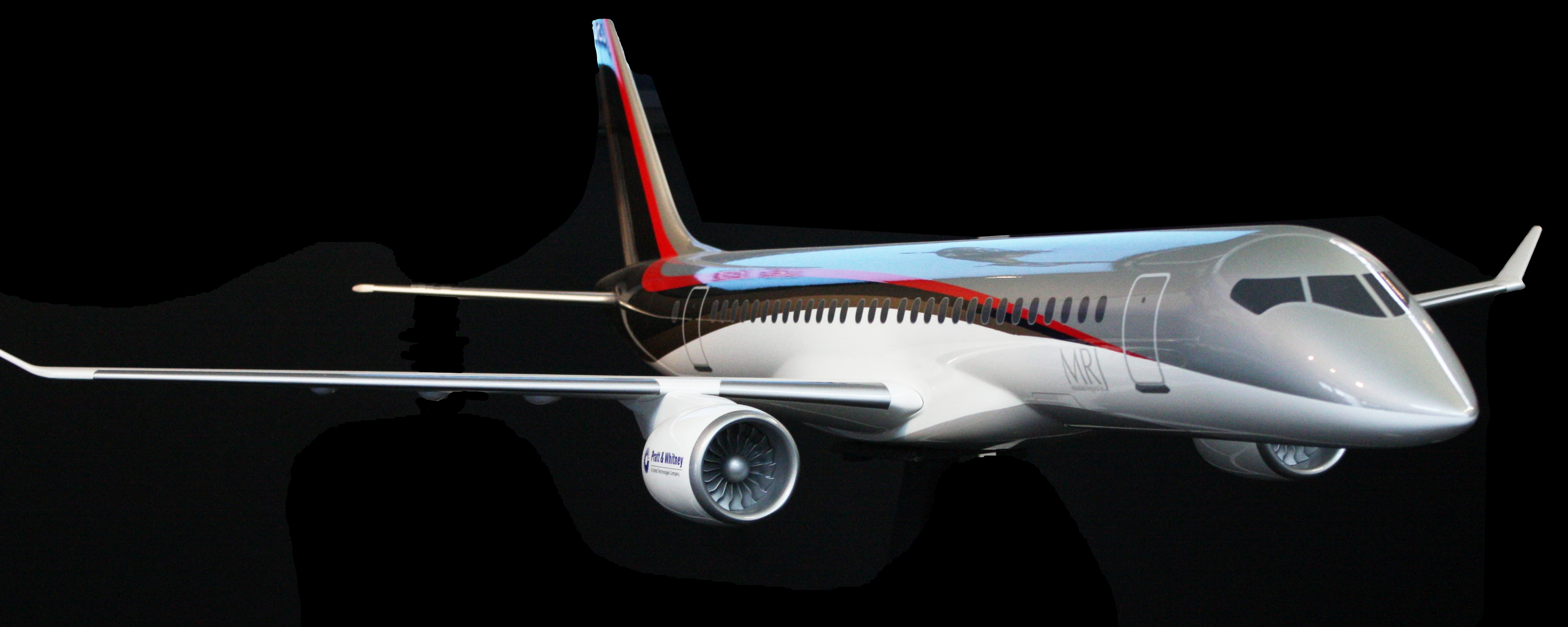 ILA 2010, am Samstag aufgenommen, meist erhöht von einer Leiter fotografiert